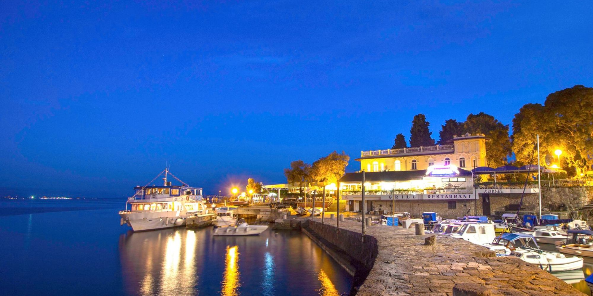 lovran -Rijeka